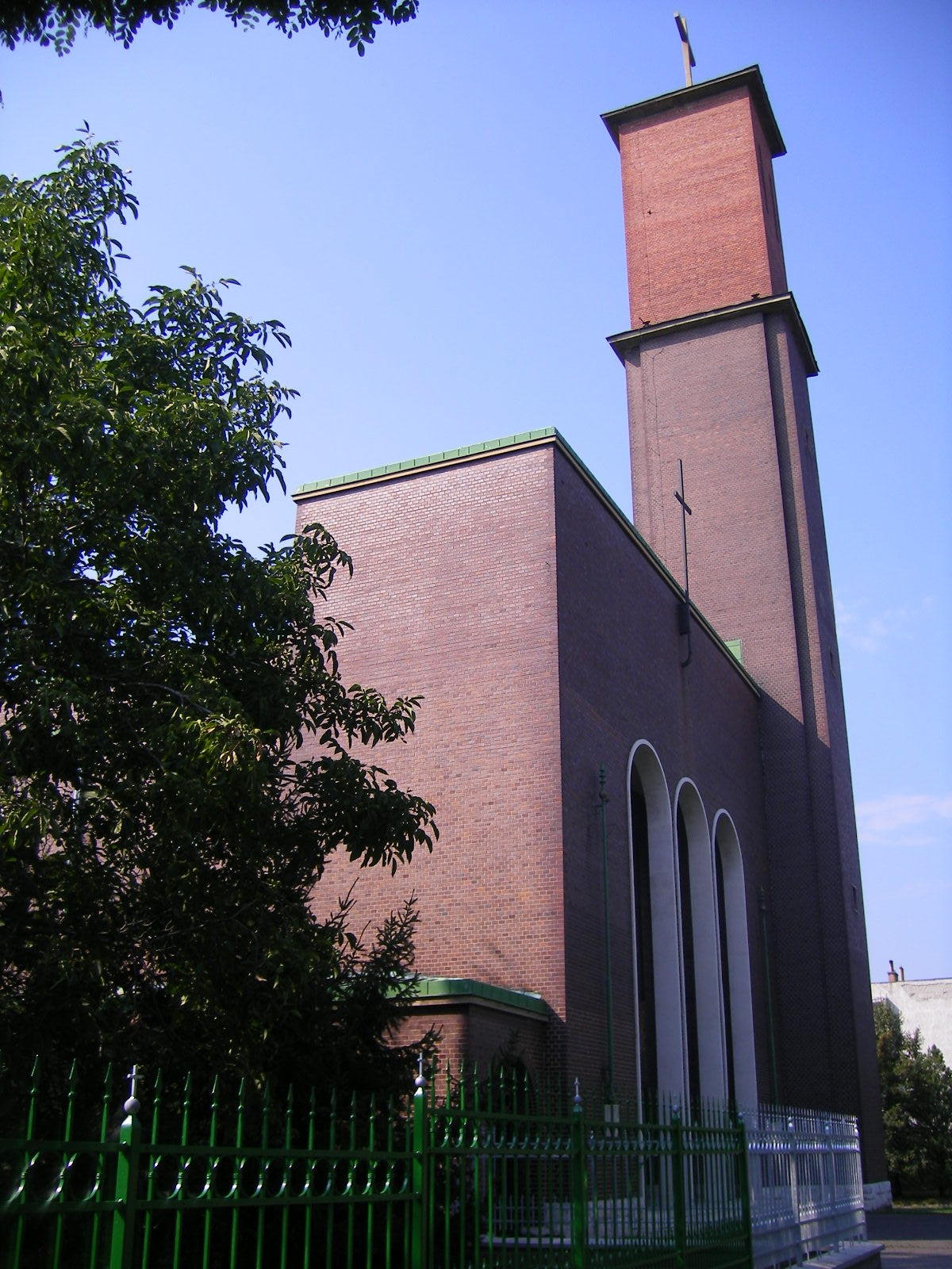 Dél-Komárom - Jézus Szíve-templom